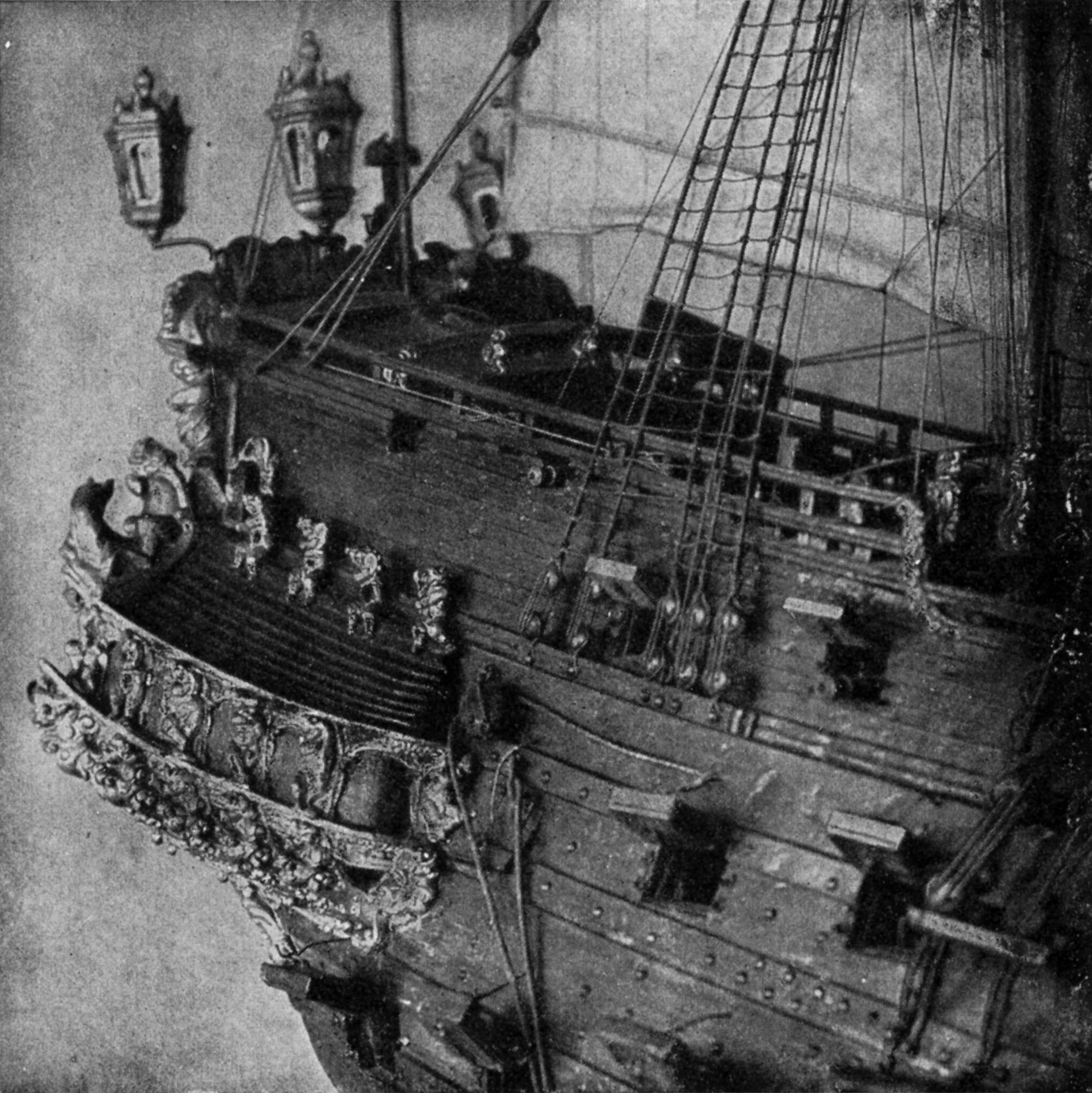 Seitengalerie am Achterschiff